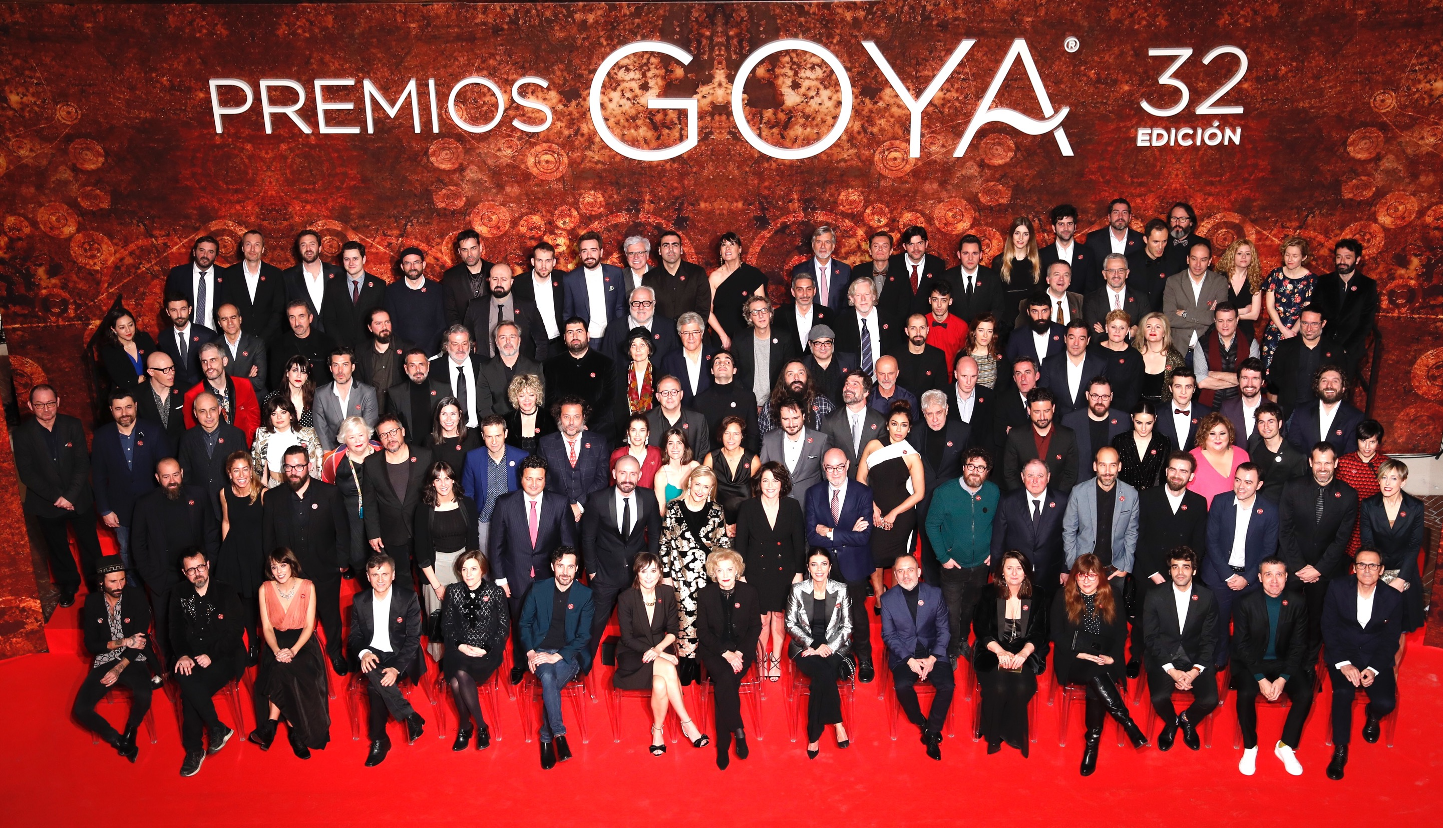 Recepción a los nominados a los Premios Goya 2018 en la Real Casa de Correos